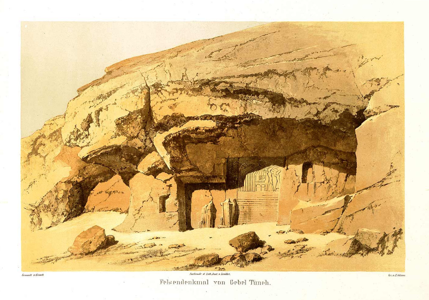 Denkmaeler aus Aegypten und Aethiopien nach den Zeichnungen der von Seiner Majestät dem Koenige von Preussen, Friedrich Wilhelm IV., nach diesen Ländern gesendeten, und in den Jahren 1842–1845 ausgeführten wissenschaftlichen Expedition auf Befehl Seiner Majestät Boundary Stela A